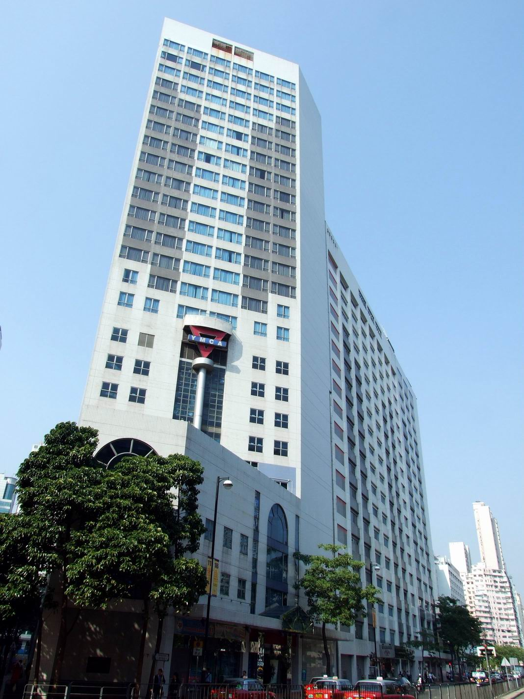 青年會國際賓館